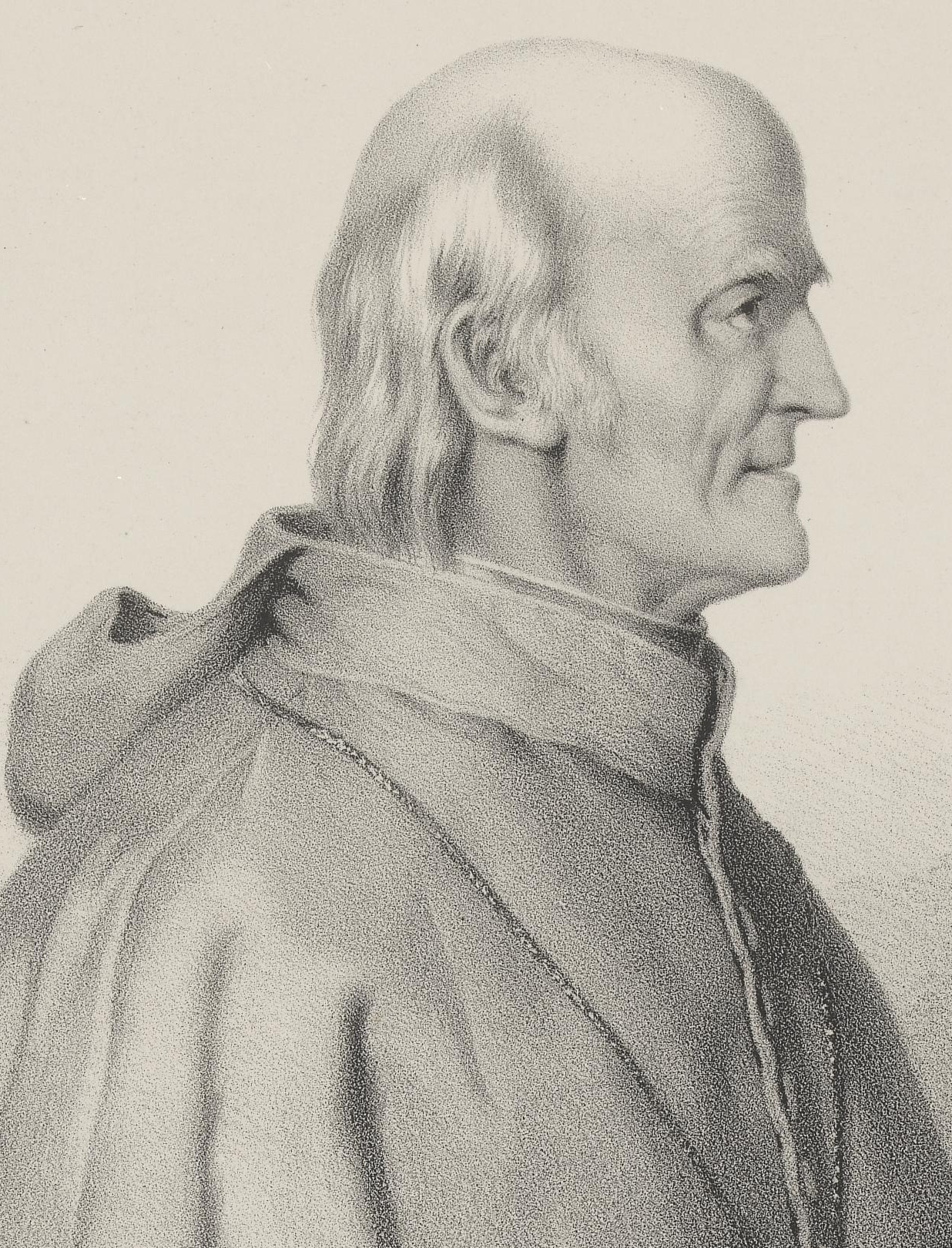 Valentin Stanič, Eigenbezeichnung: Valentin Stanig (* 12. Februar 1774 in Bodrez bei Kanal ob Soči; † 29. April 1847 in Görz, Küstenland) war ein österreichischer Geistlicher, Lehrer, Forscher, Humanist und Bergsteiger slowenischer Abstammung.